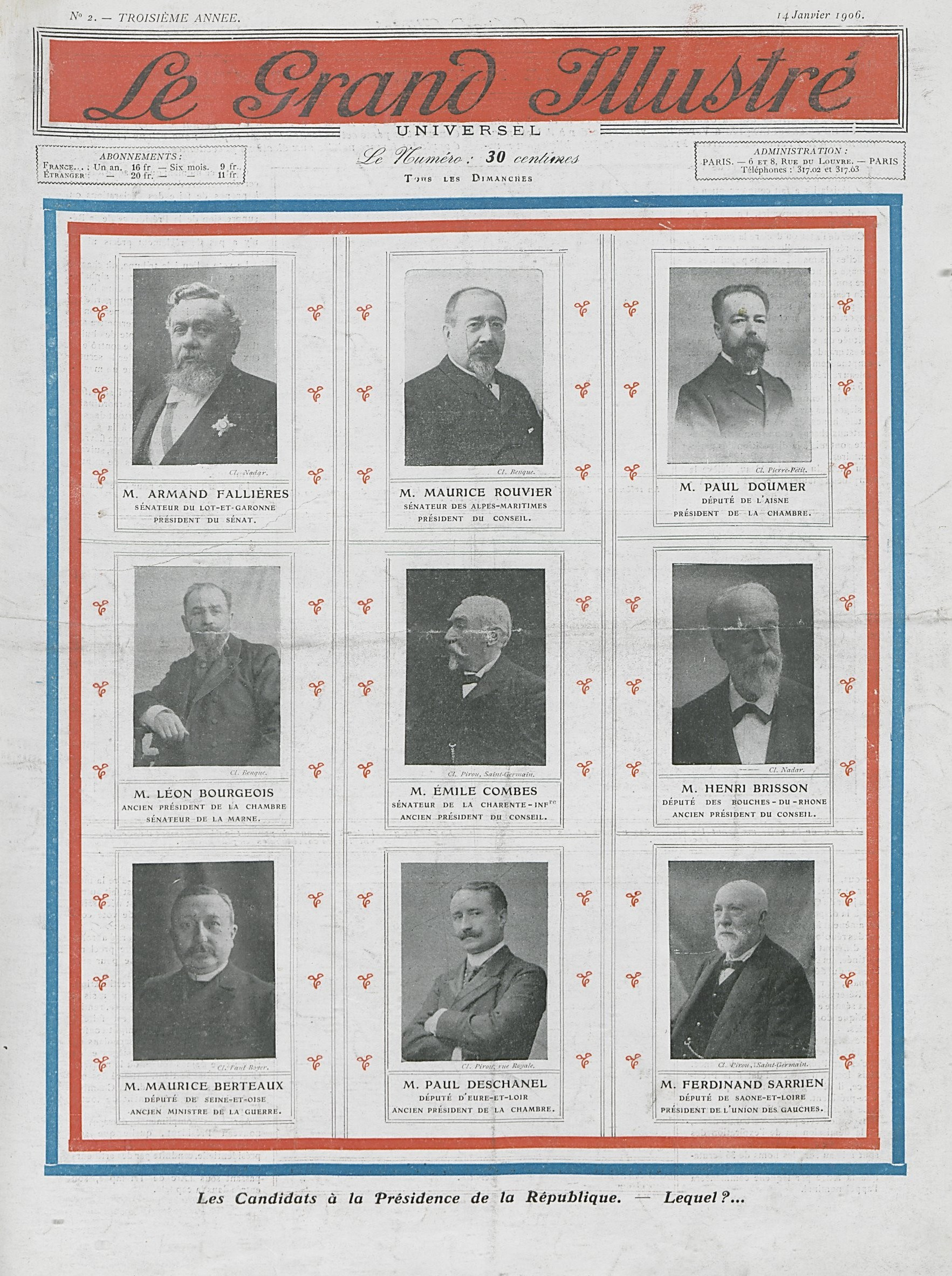 Candidats à l'élection présidentielle française de 1906.